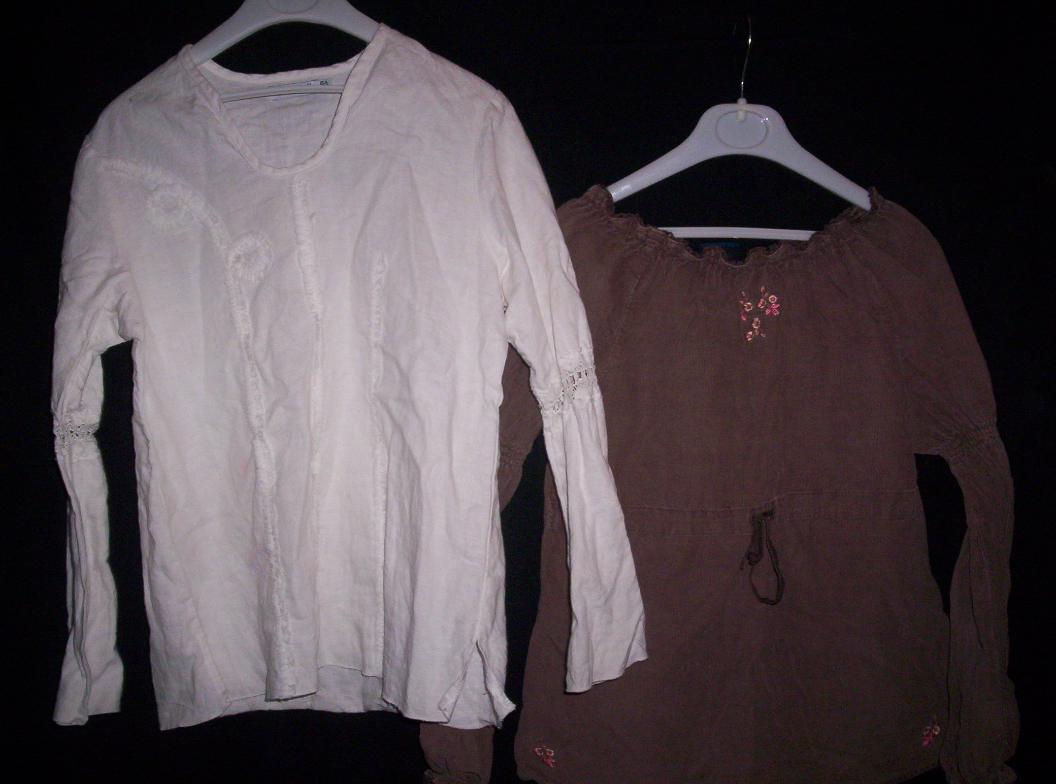 Tunique01.jpg